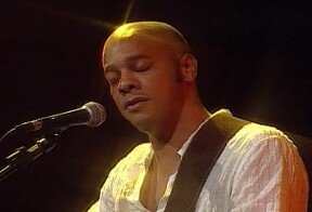 Cantor brasileiro Vander Lee em imagem do acervo da TV Brasil.